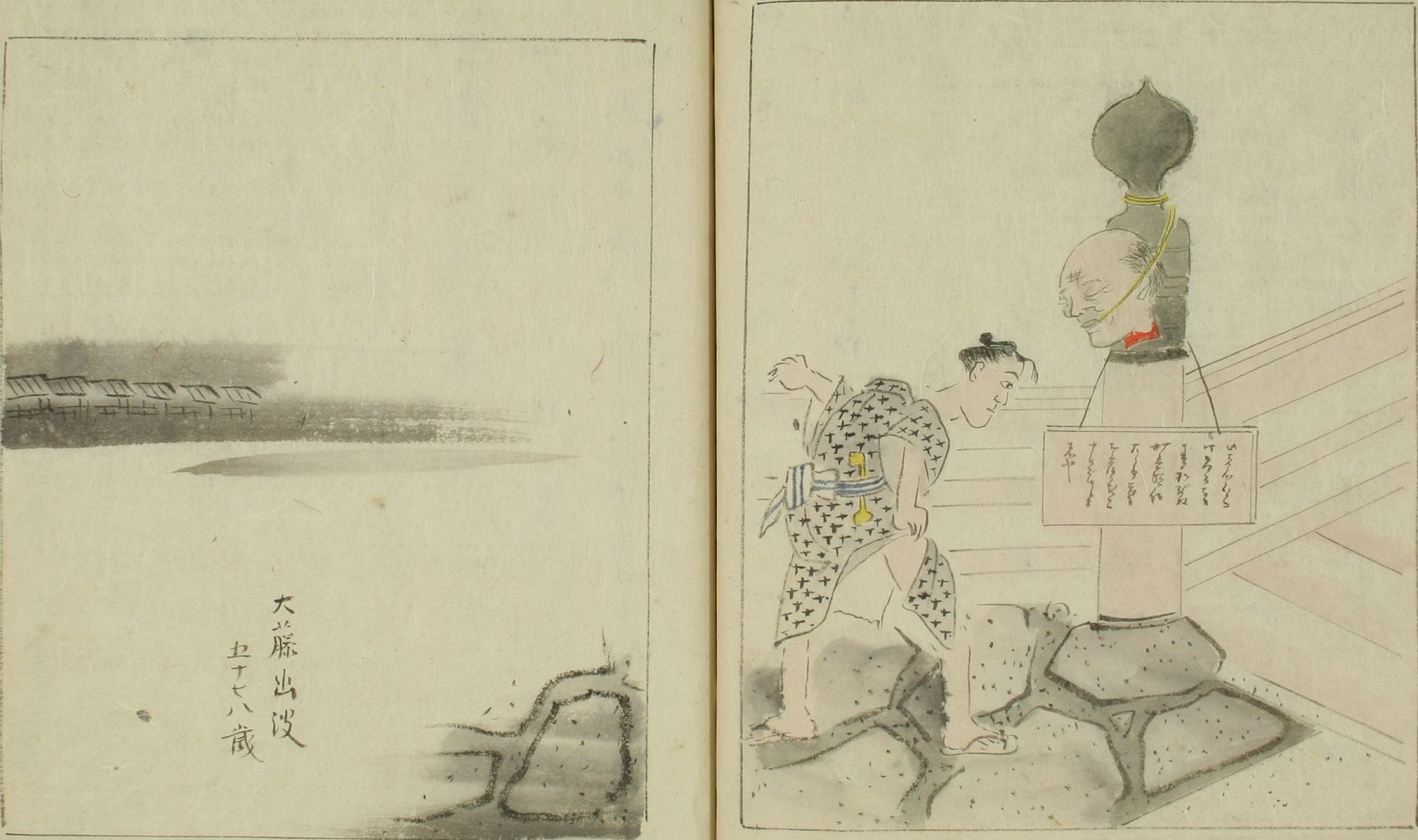 早稲田大学図書館所蔵『風説都之錦』後編巻之ニ「大藤幽叟梟首之事并図」